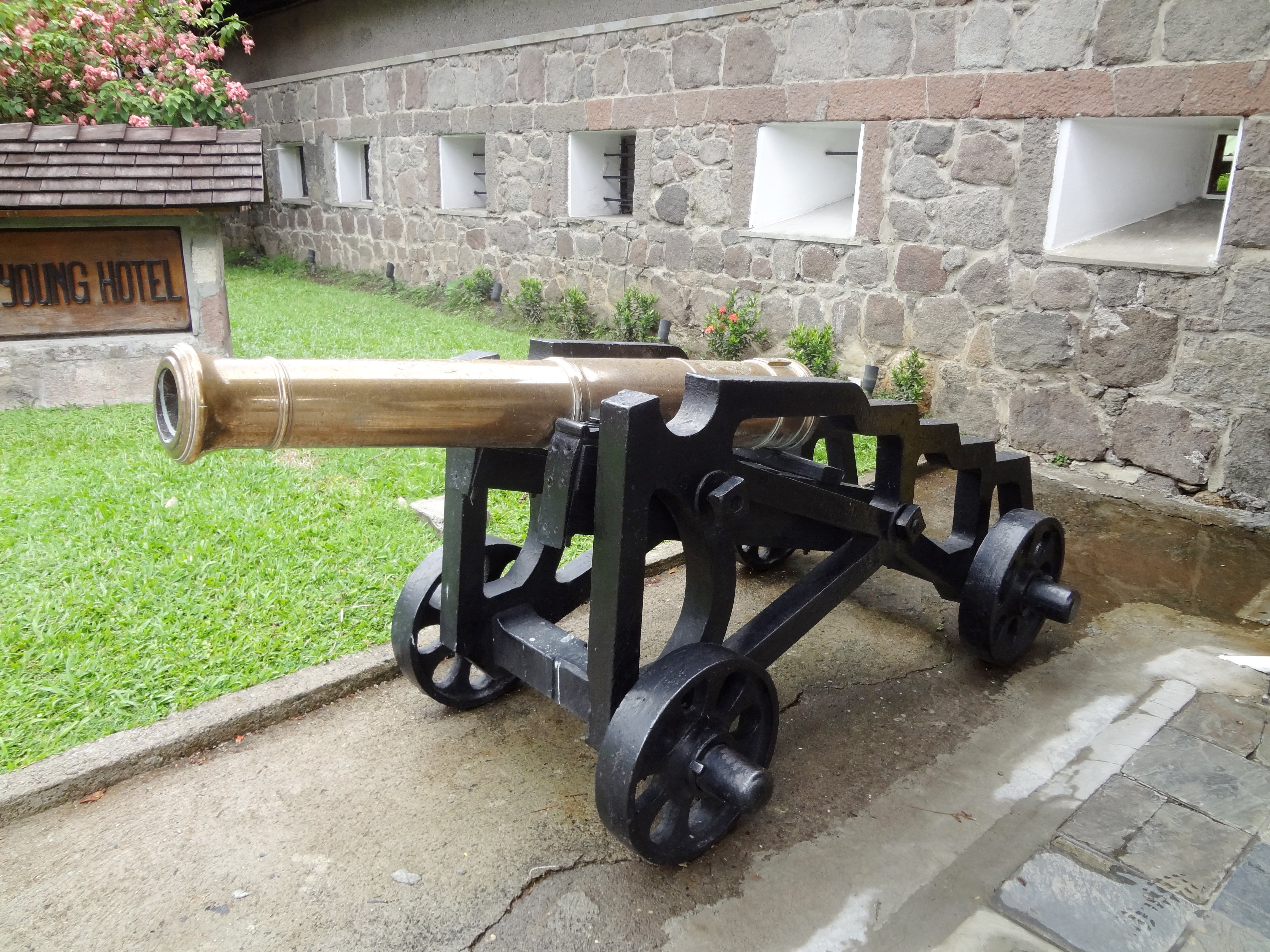 Cannon by the main entrance of the Fort Young Hotel, Roseau, Dominica